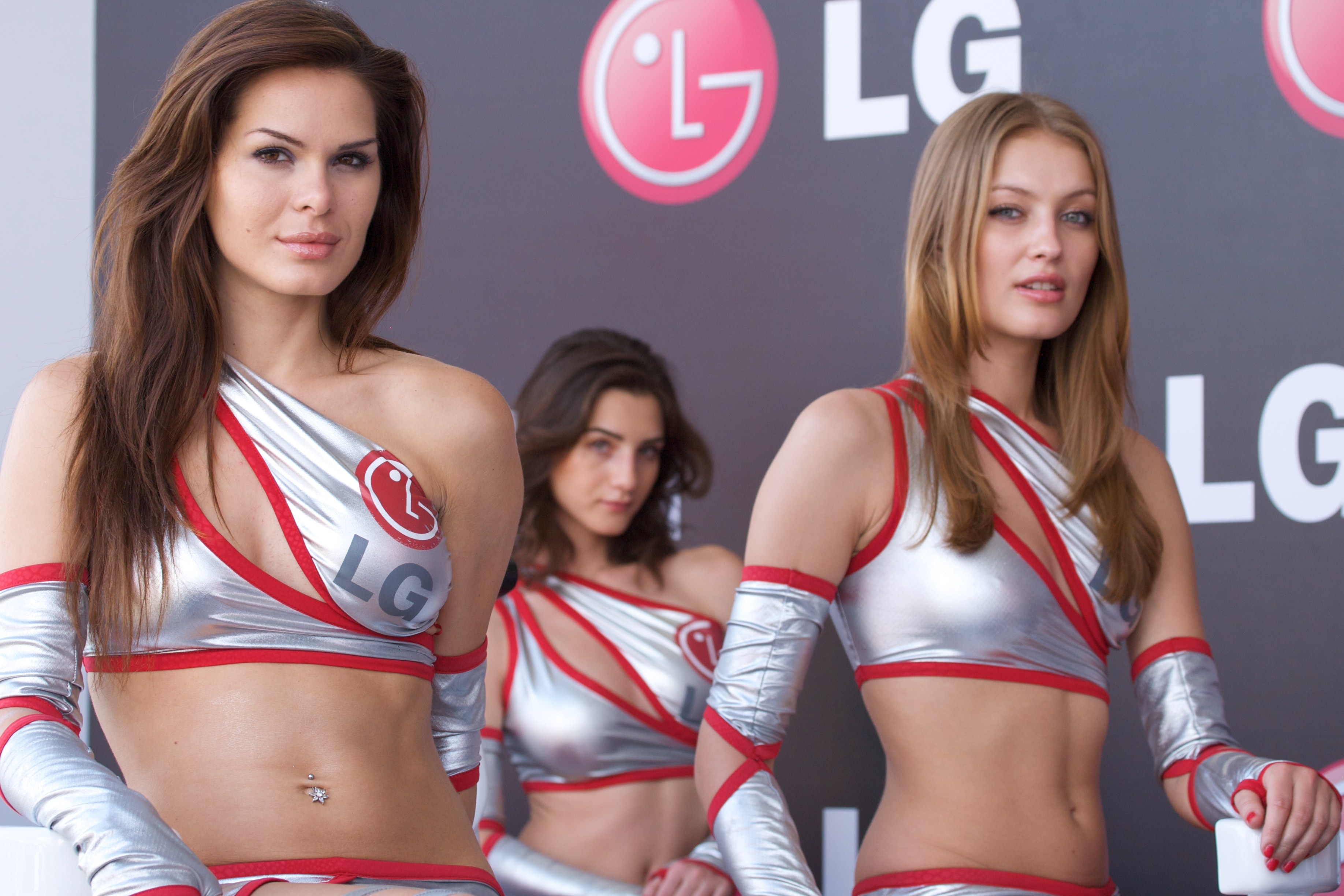 LG Girls